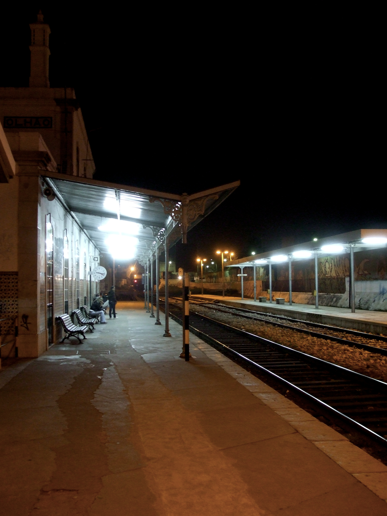 Tipo: EP (Estação) Local: Olhão [Linha do Algarve, PK 350] Data e hora: 21 de Fevereiro de 2009 [21h16]